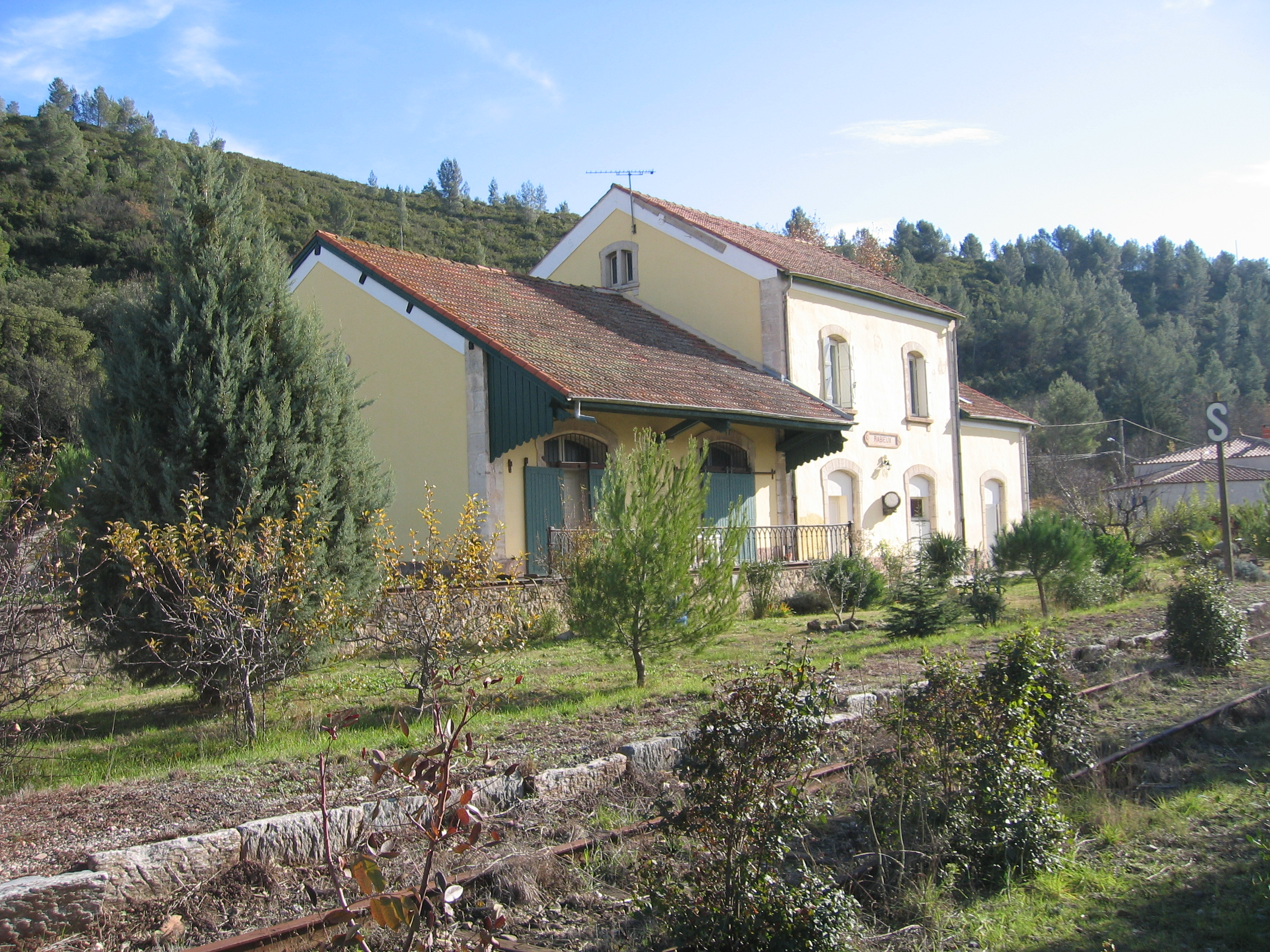 Chemins de fer de l'Hérault - Rabieux, la gare du Midi